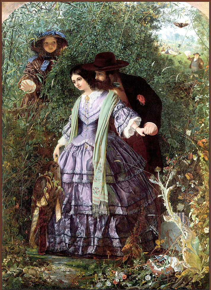 Genre painting